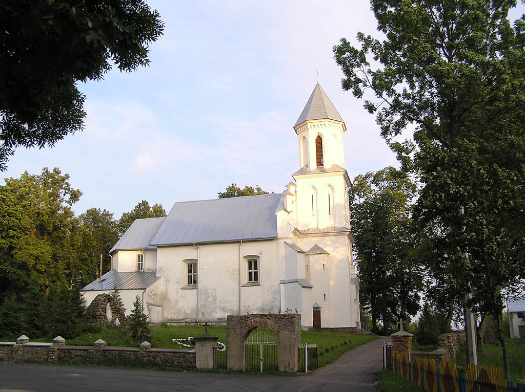 Беларуская (тарашкевіца): Уселюб